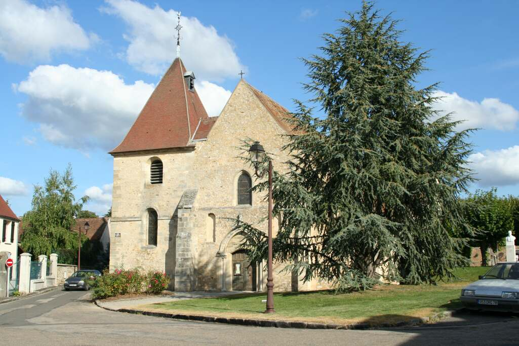 Église d'Ecquevilly - Yvelines (France)